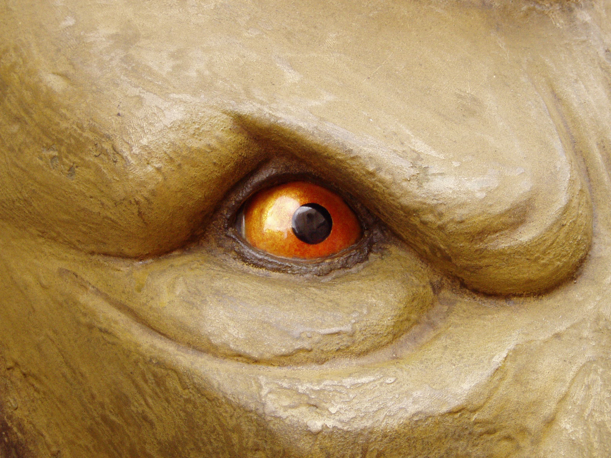 l'ull del lléo